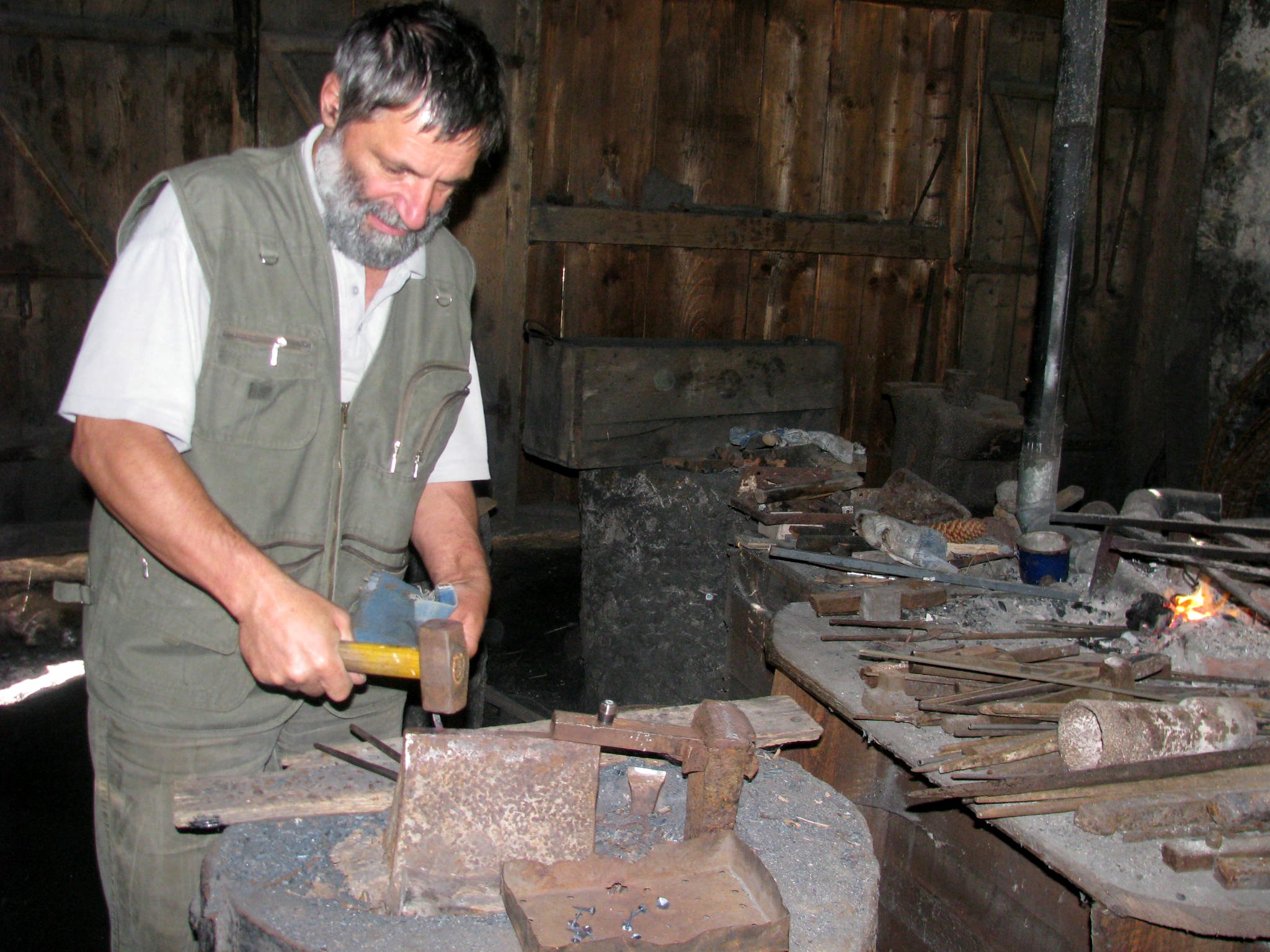 Vigenjc Vice